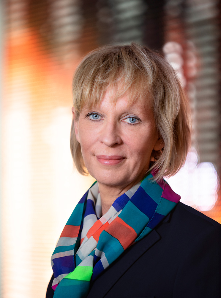 Porträtaufnahme von Christina Haak im Foyer des Kulturforums in Berlin, 2020, Foto: David von Becker